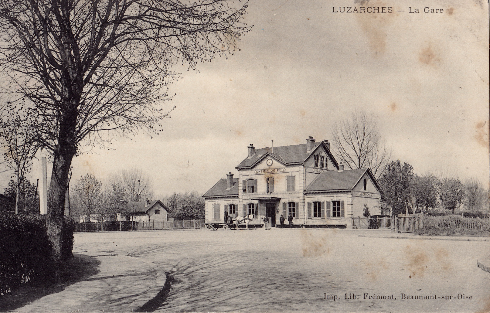 carte postale ancienne éditée par Frémont à Beaumont-sur-Oise : LUZARCHES - La Gare